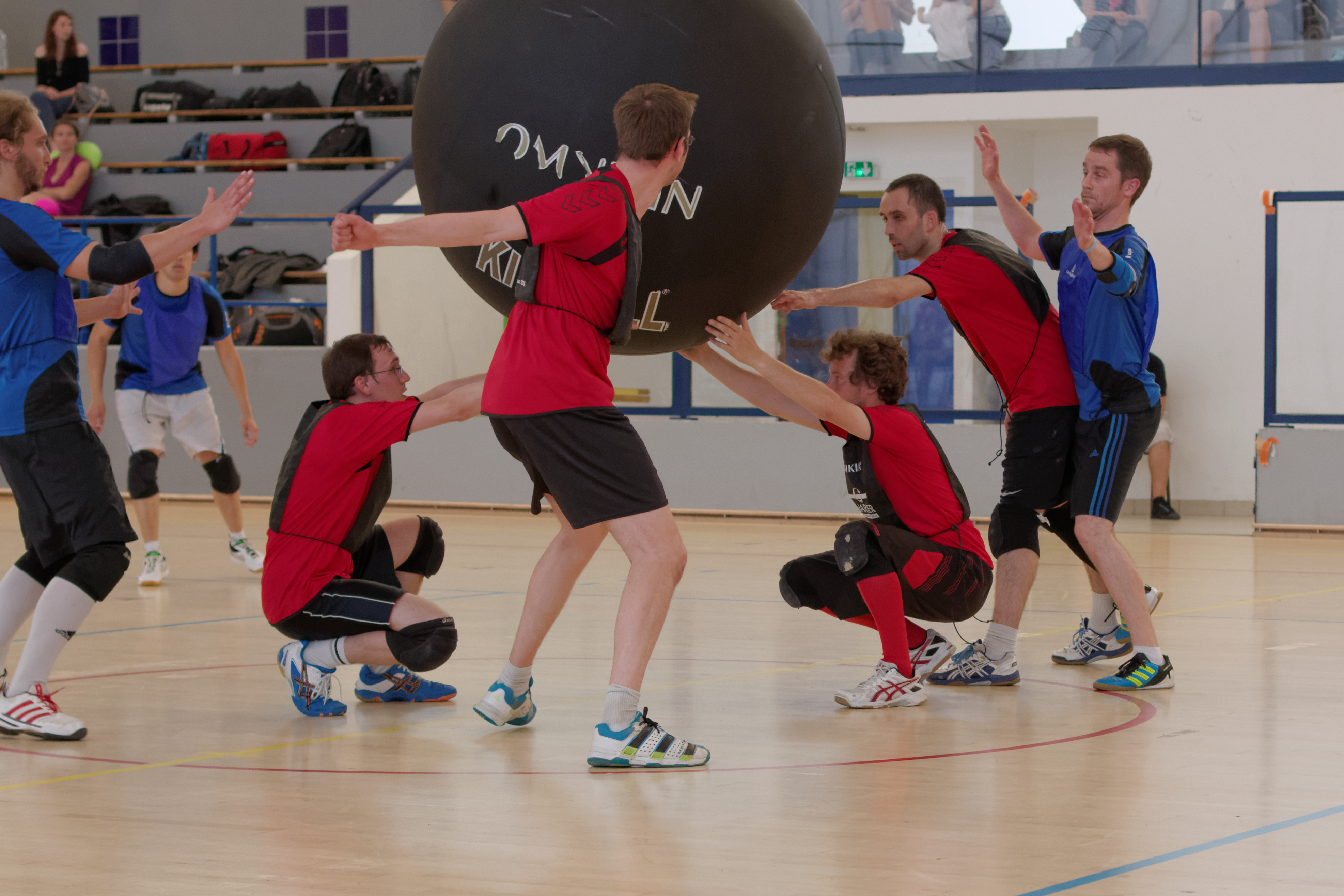 20e journée du championnat de France 2013-2014 de Kin-Ball, 8 juin 2014, Gymnase George Carpentier, Paris.